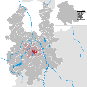 Lunzig in Thuringia - District Greiz